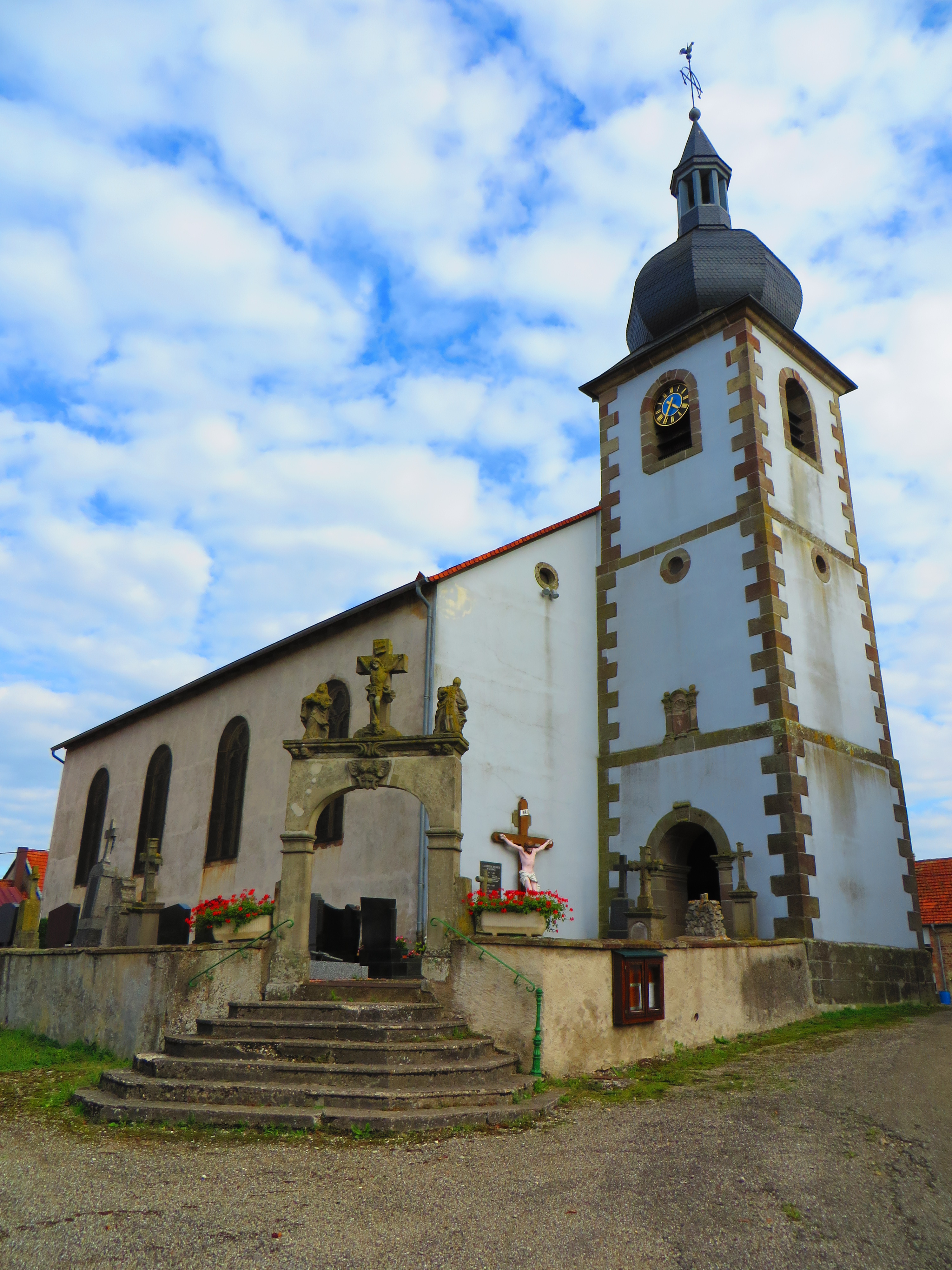 Honskirch l'église Saint-Jean-Baptiste